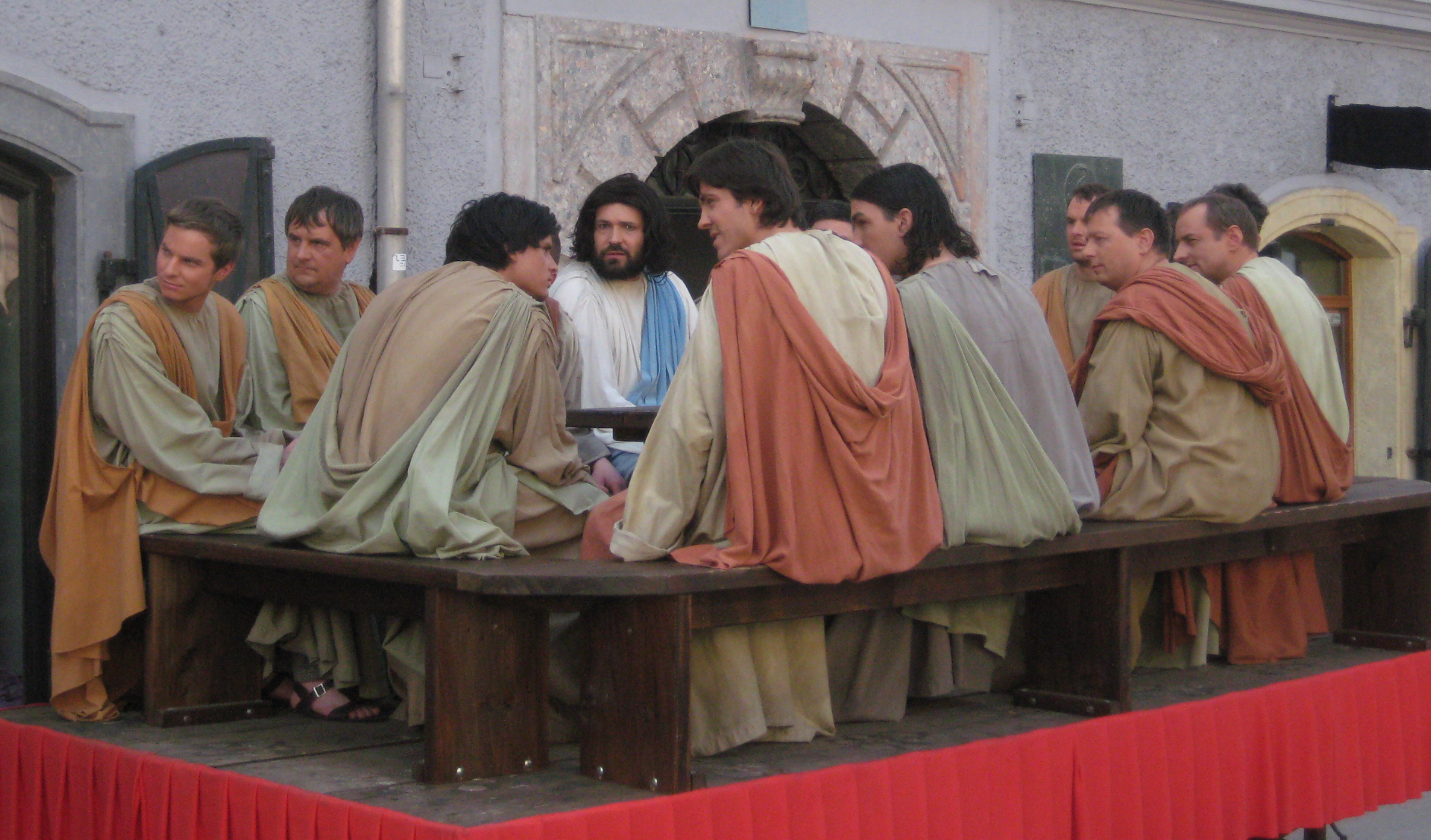 Škofjeloški pasijon (Processio Locopolitana), izvedba 2009 v Škofji Loki